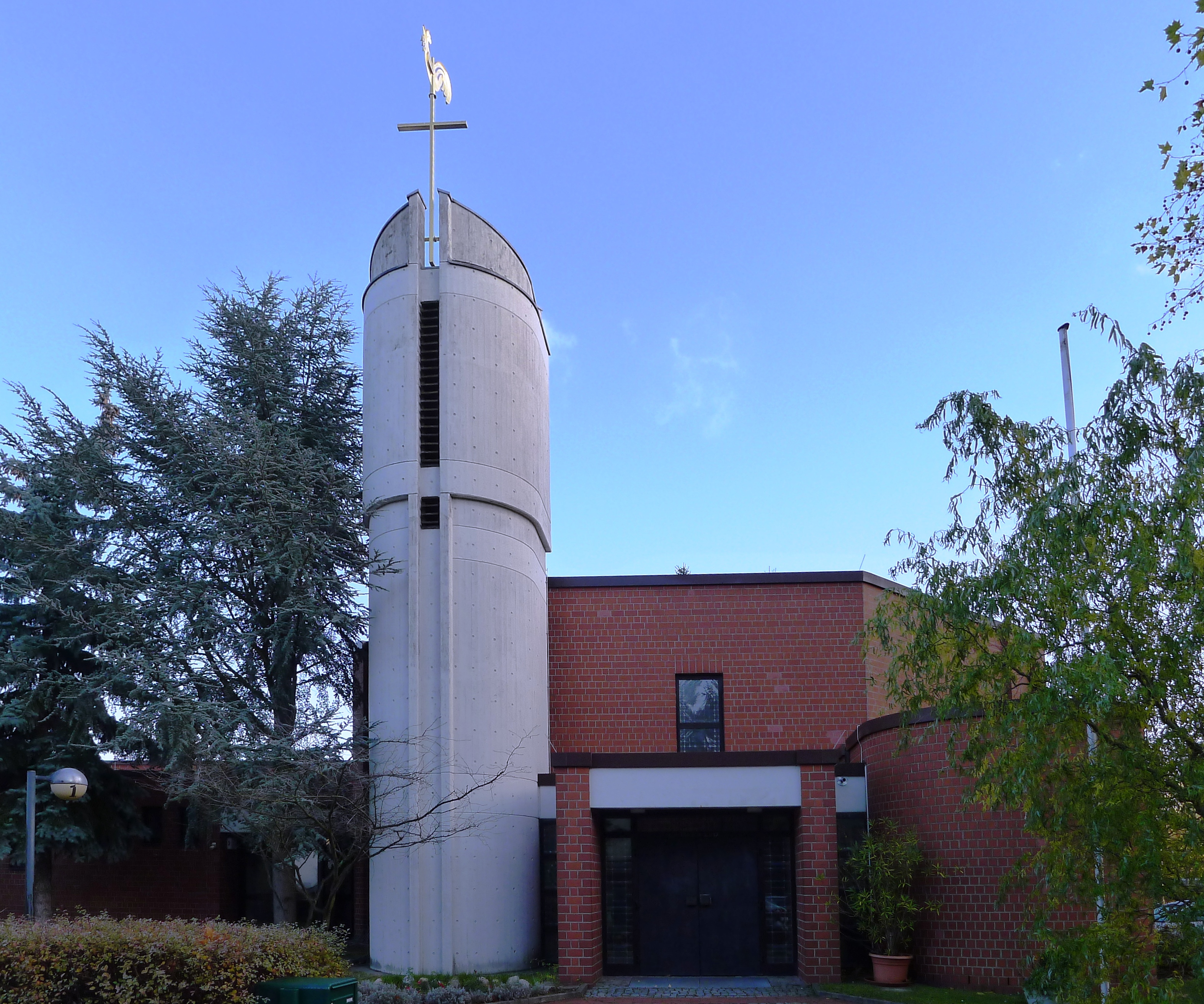 Portal des Kirchengebäudes und Campanile